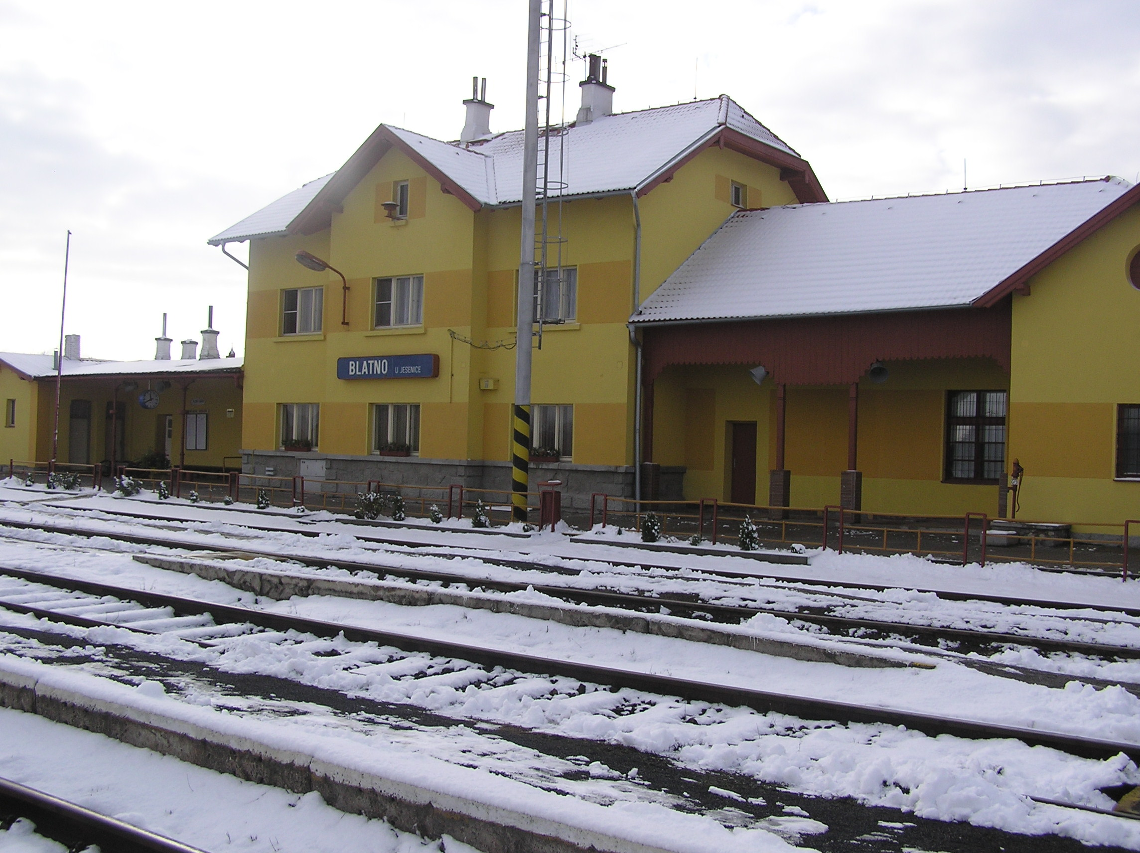 Nádraží v Blatně